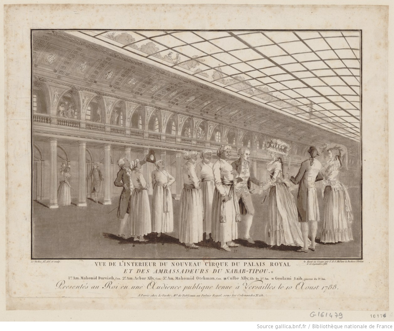 Vue de l'intérieur du cirque du Palais-Royal en 1788.